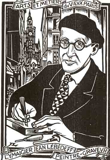 Jean Lébédeff (ou Ivan Lebedev)1, né à Bogorodsk (Russie) le 25 novembre 1884 et mort à Nîmes le 21 septembre 1972, est un graveur sur bois et peintre libertaire français.